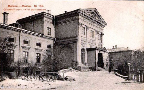 Усадьба Разумовского в Романовом переулке